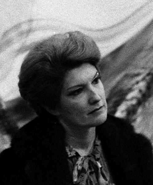 Librairie Privat à Toulouse. Le 10 Octobre 1975. Plan rapproché de la chanteuse soprano Mady Mesplé, en arrière plan des personnes assisent devant une toile représentant une fresque décorative. Cliché pris lors d'un récital chez le libraire Pierre Privat.